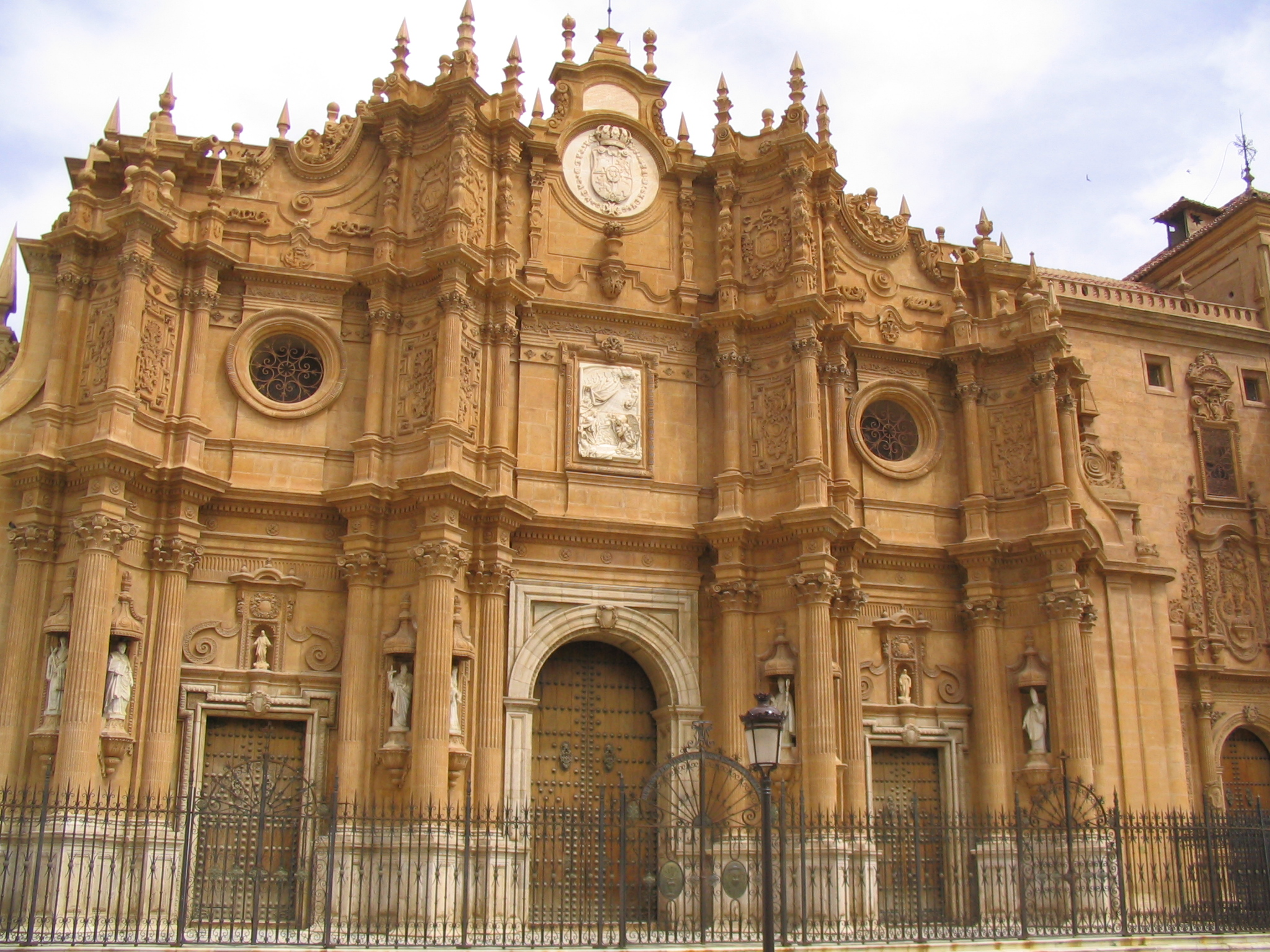 Fachada de la catedral de Guadix (Granada, España)